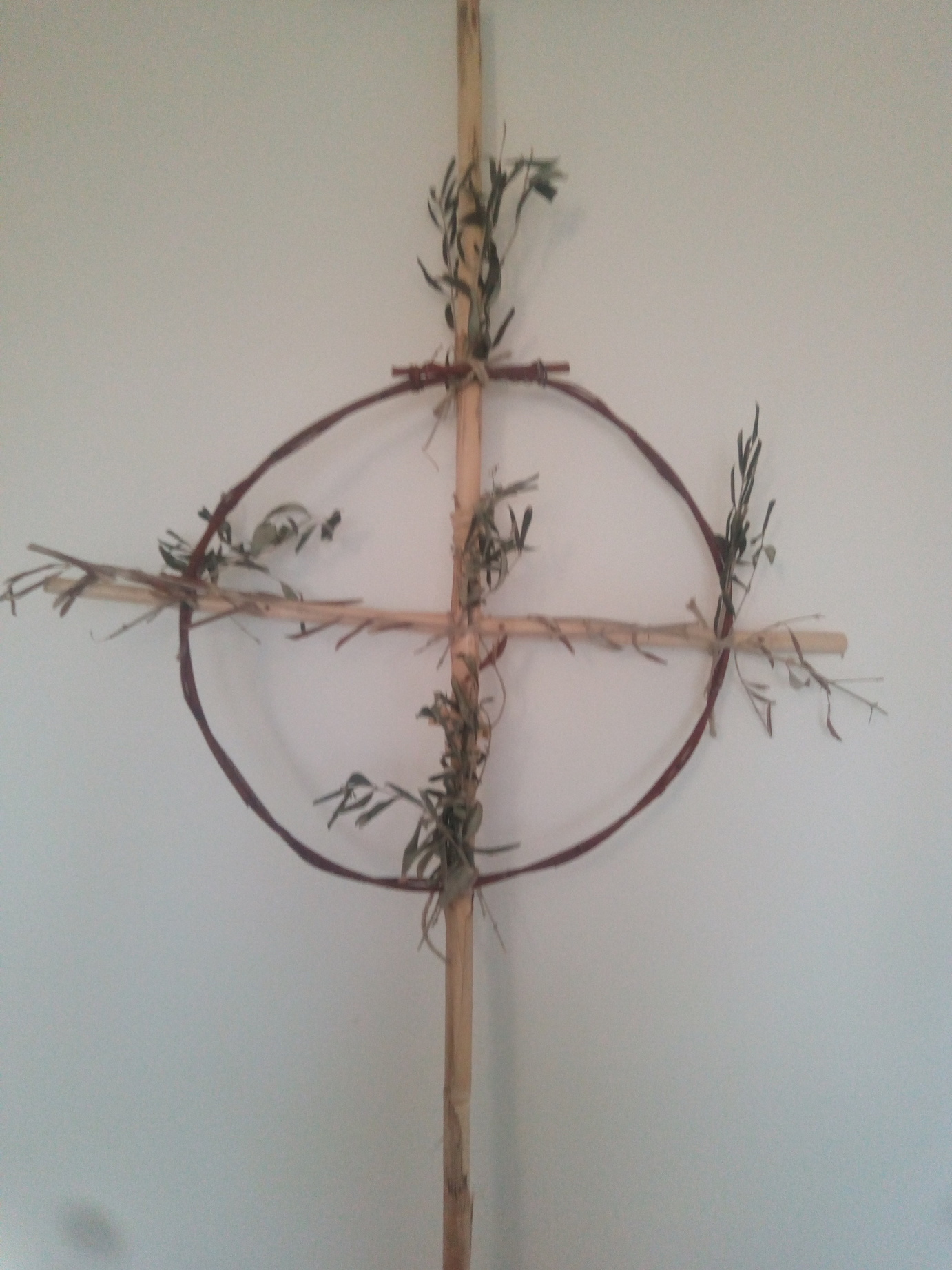 Croce propiziatoria. Tradizione romagnola.